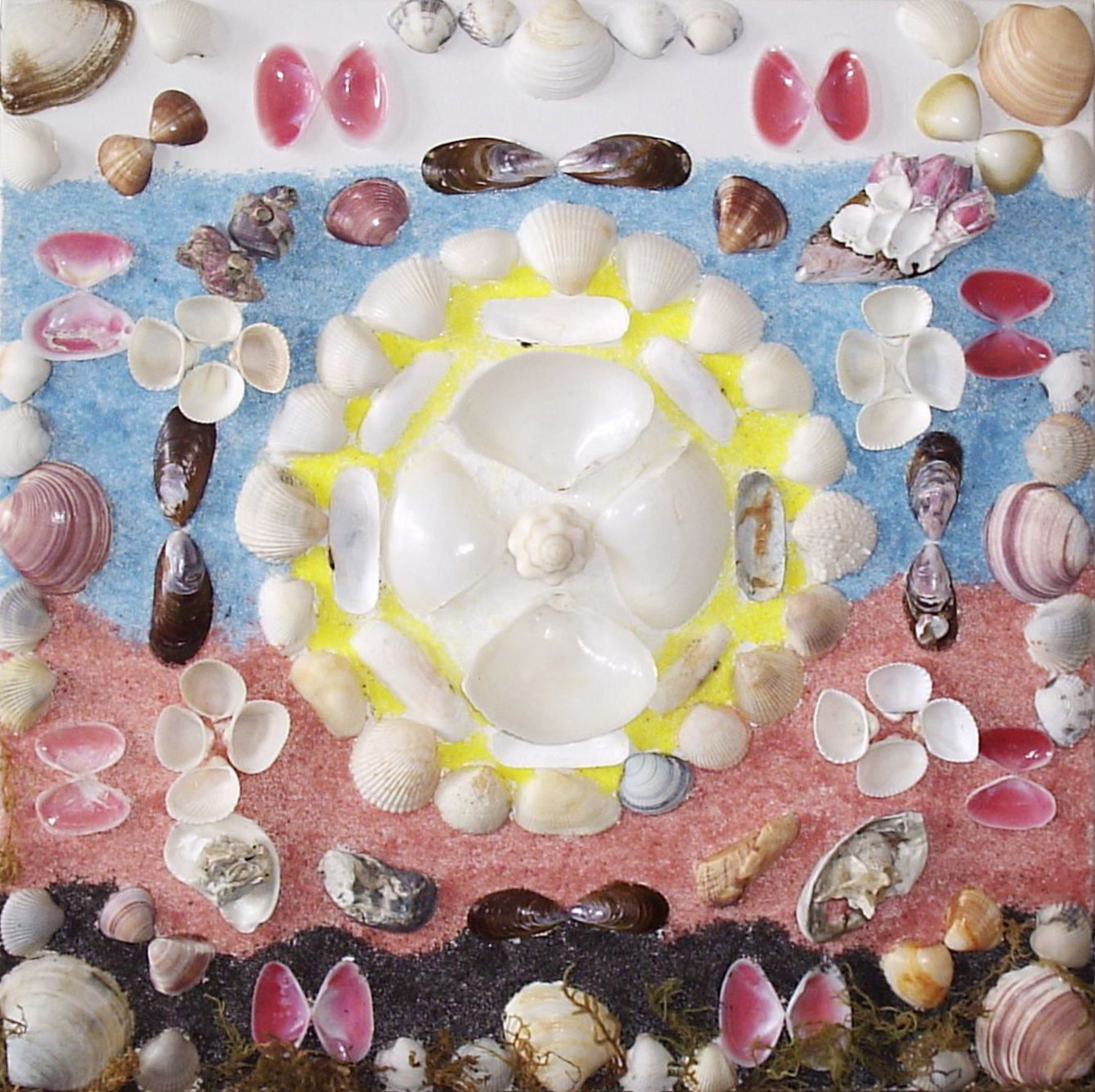 Mandala de conchas configurando a quaternidade psíquica, com destaque para a função inferior, com suas formas mais indiferenciadas...